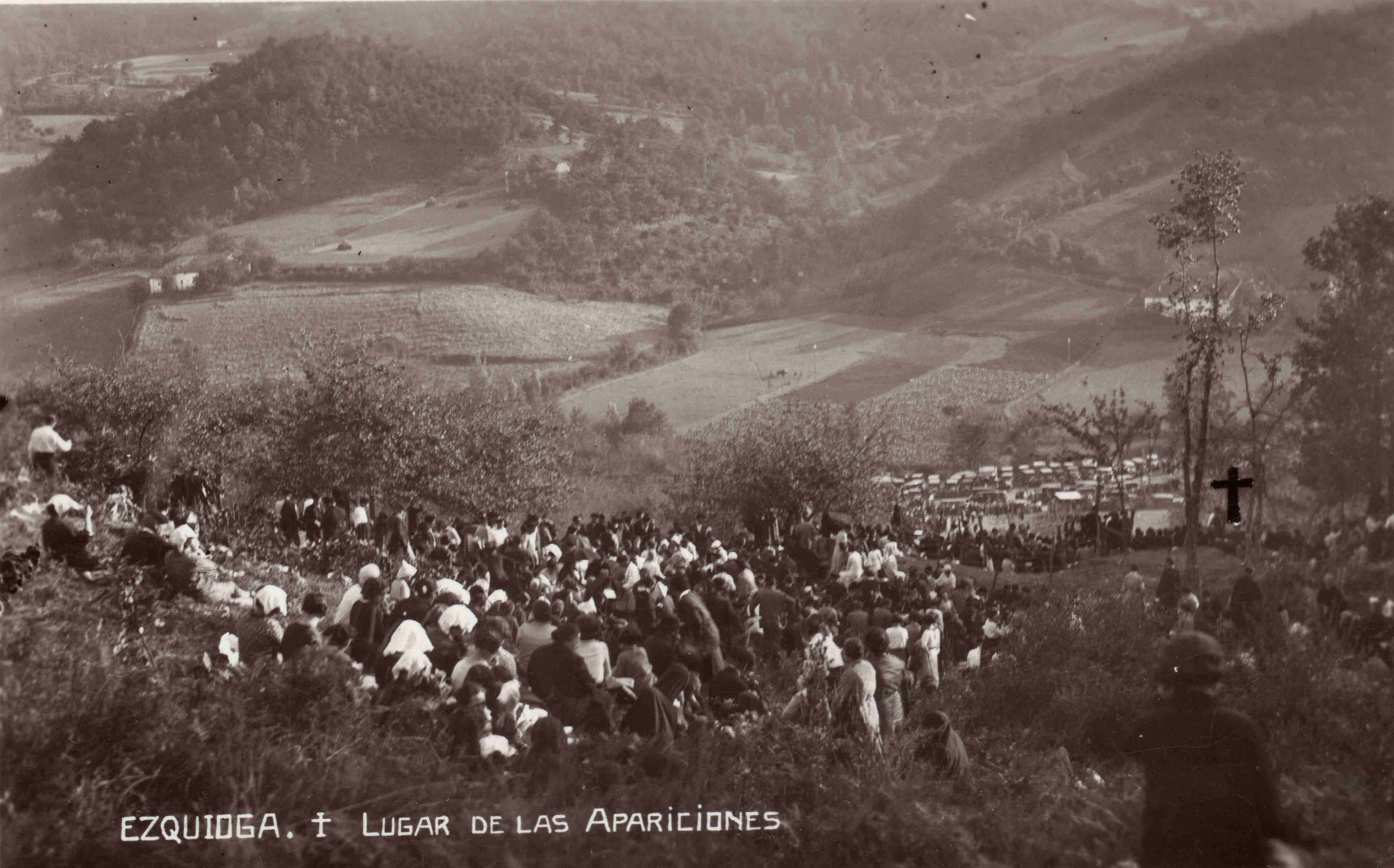 Ezkioko (Gipuzkoa) agerkundeen lekuan, jendetza (1931)